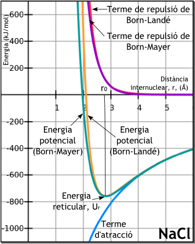 Gràfic on es representa l'energia potencial corresponent a l'enllaç iònic del clorur de sodi, NaCl, a partir de les equacions de Born-Landé i de Born-Mayer.